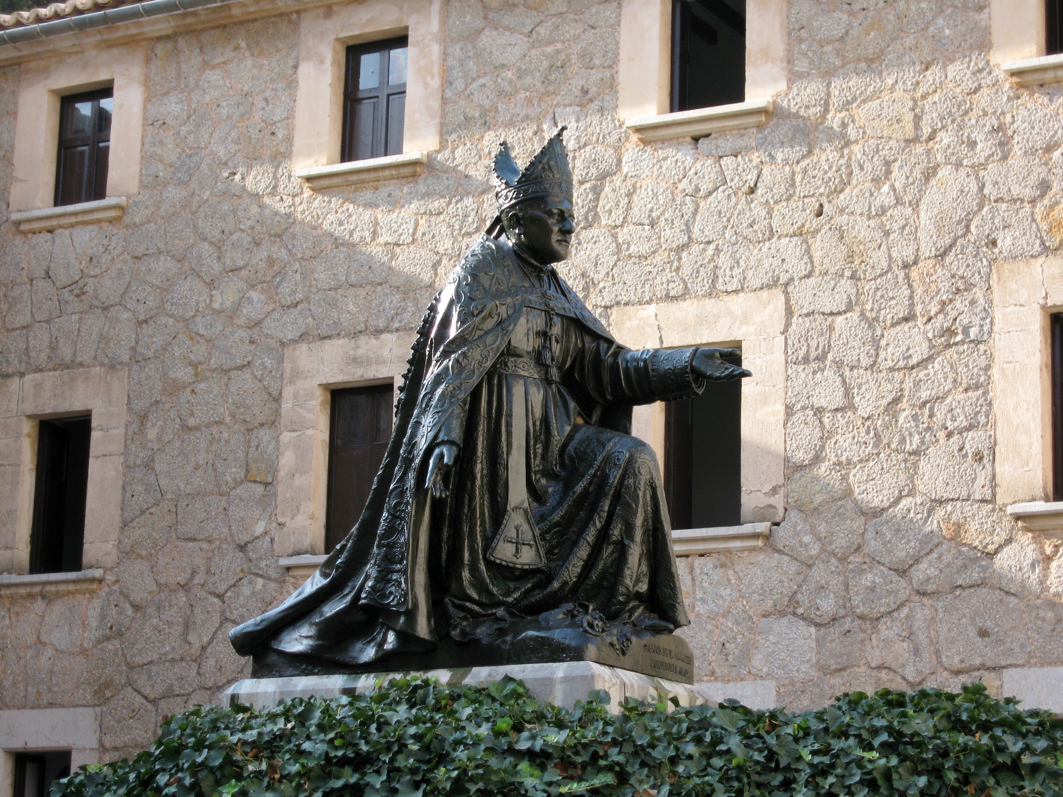 Santuari de Lluc, Gemeinde Escorca, Mallorca, Spanien